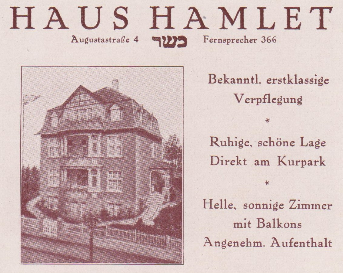 Deutschland - Nordrhein-Westfalen - Kreis Lippe - Bad Salzuflen: Anzeige in "Lippisches Bad Salzuflen - Wohnungs-Anzeiger 1929"